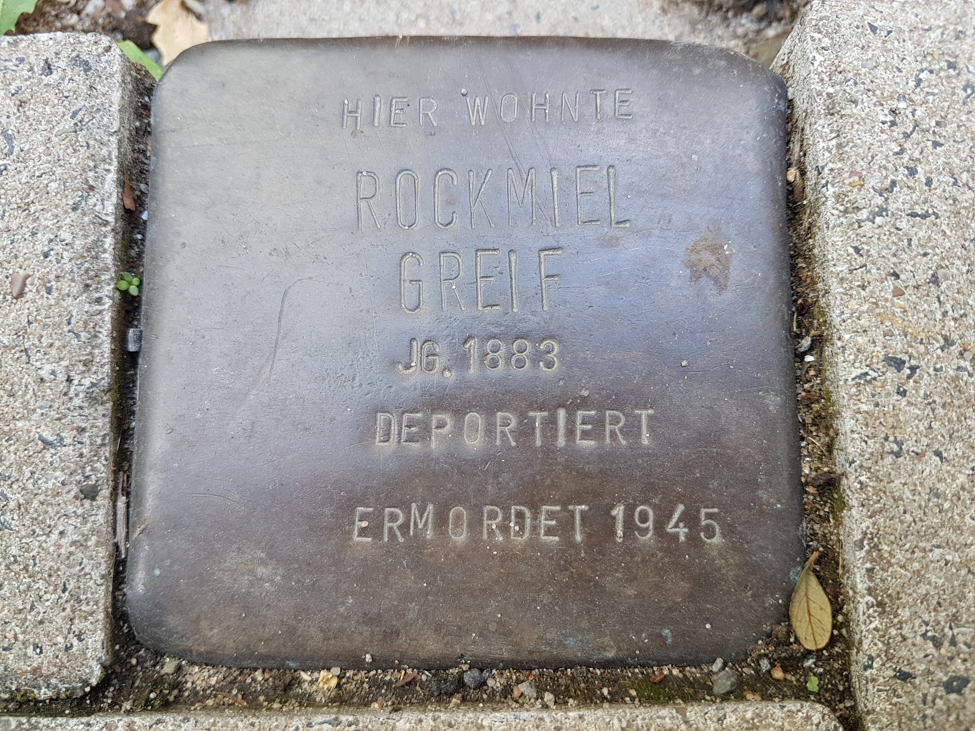 Stolperstein Duisburg Rockmiel Greif